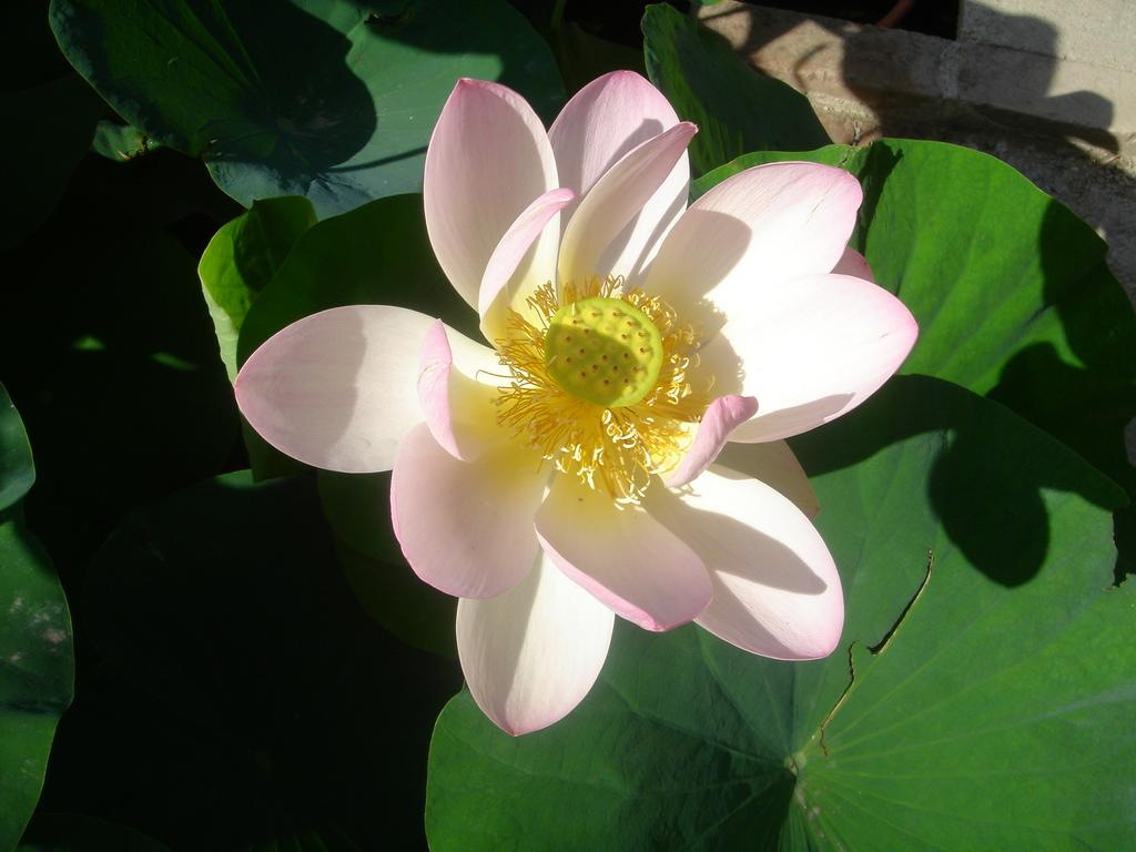 Fleur de lotus